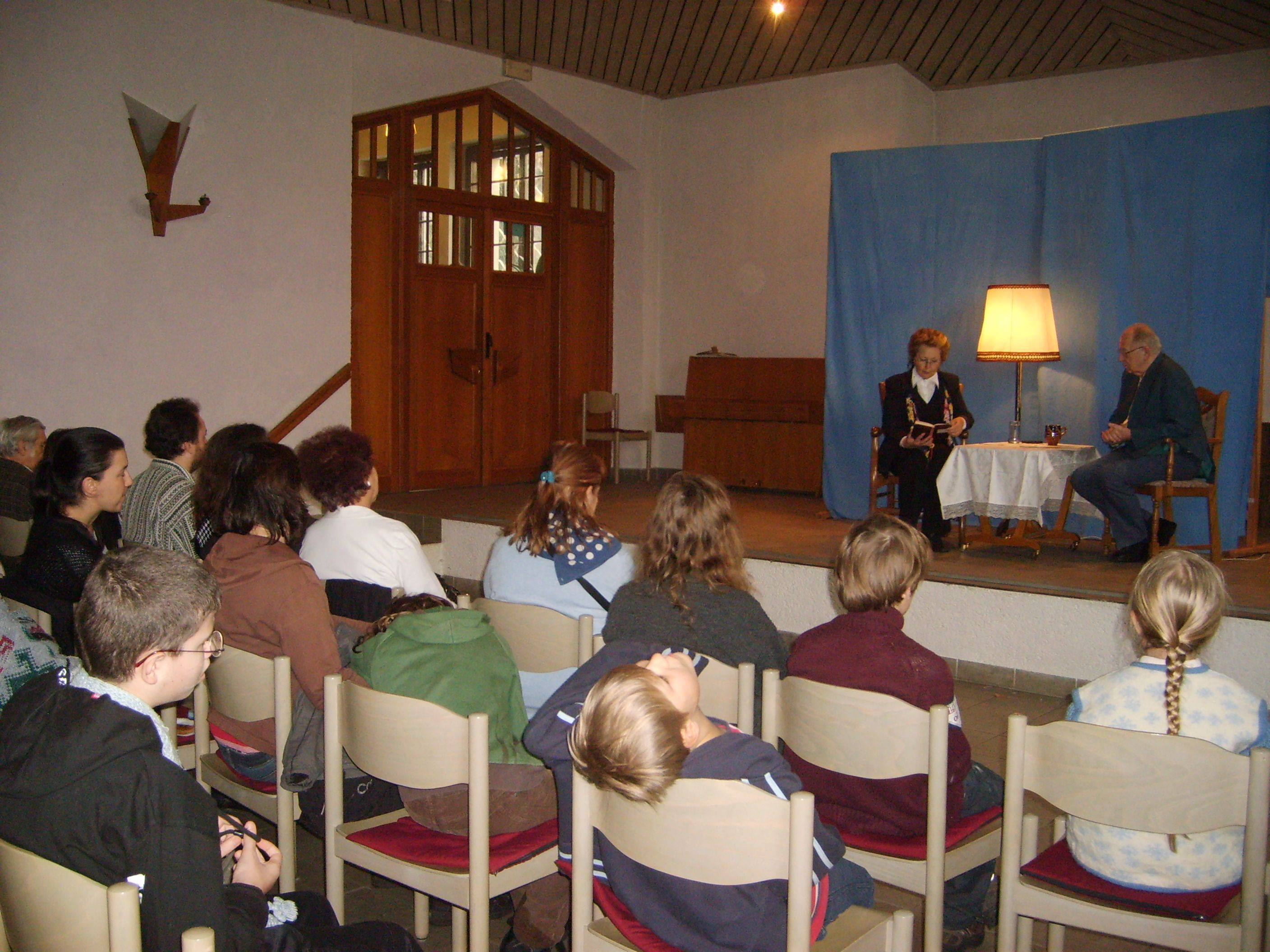 Autorské čtení Olgy Suchomelové v kapli Obce křesťanů při příležitosti konání předvánočního jarmarku. Moderoval PhDr Jiří Pondělíček.